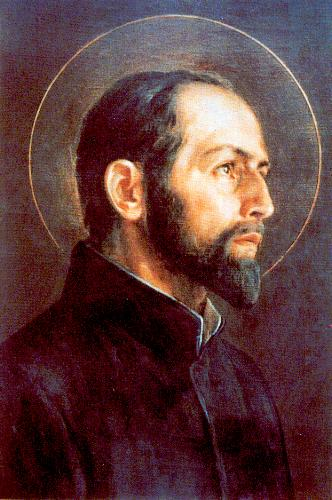 Pintura de San Antonio Maria Zaccaria